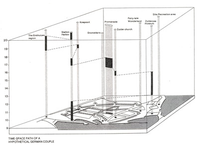 Eigen ontwerp